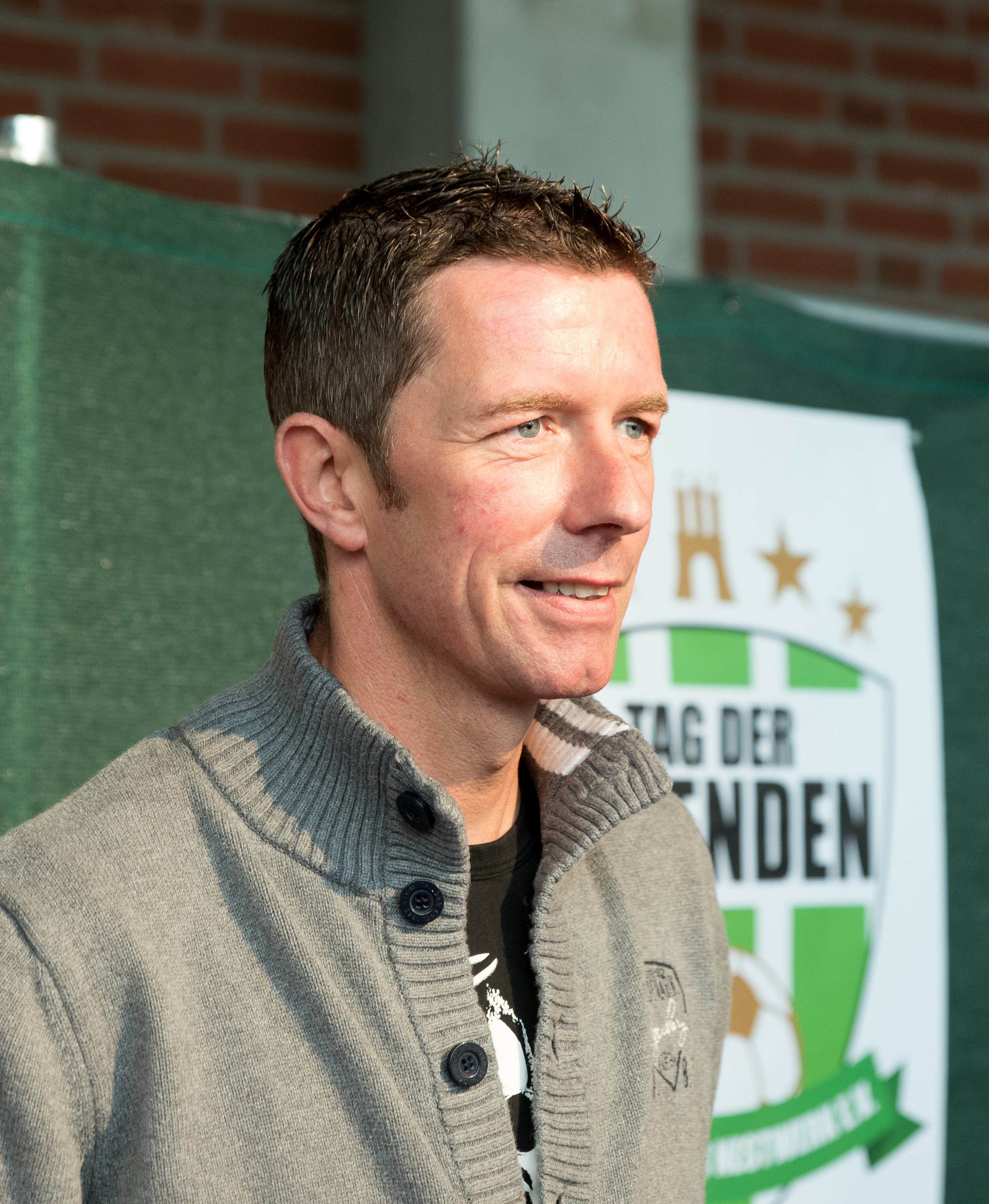 Nico Patschinski beim Tag der Legenden 2016